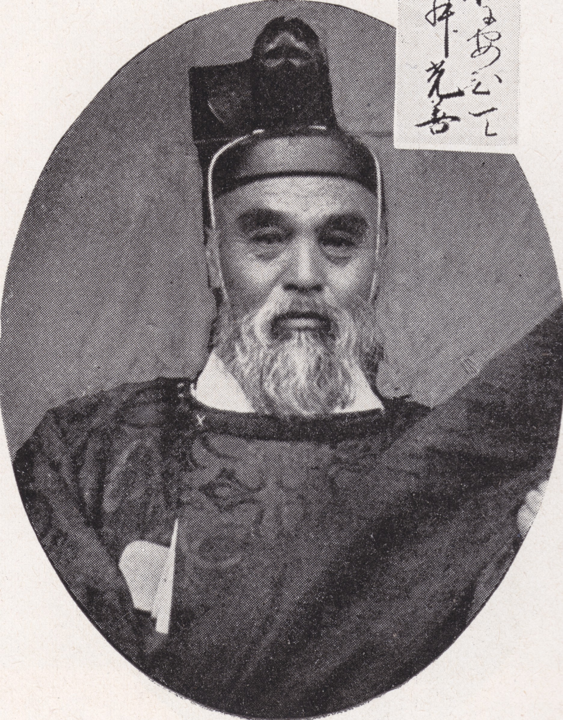 大礼使典儀官・子爵日野西光善